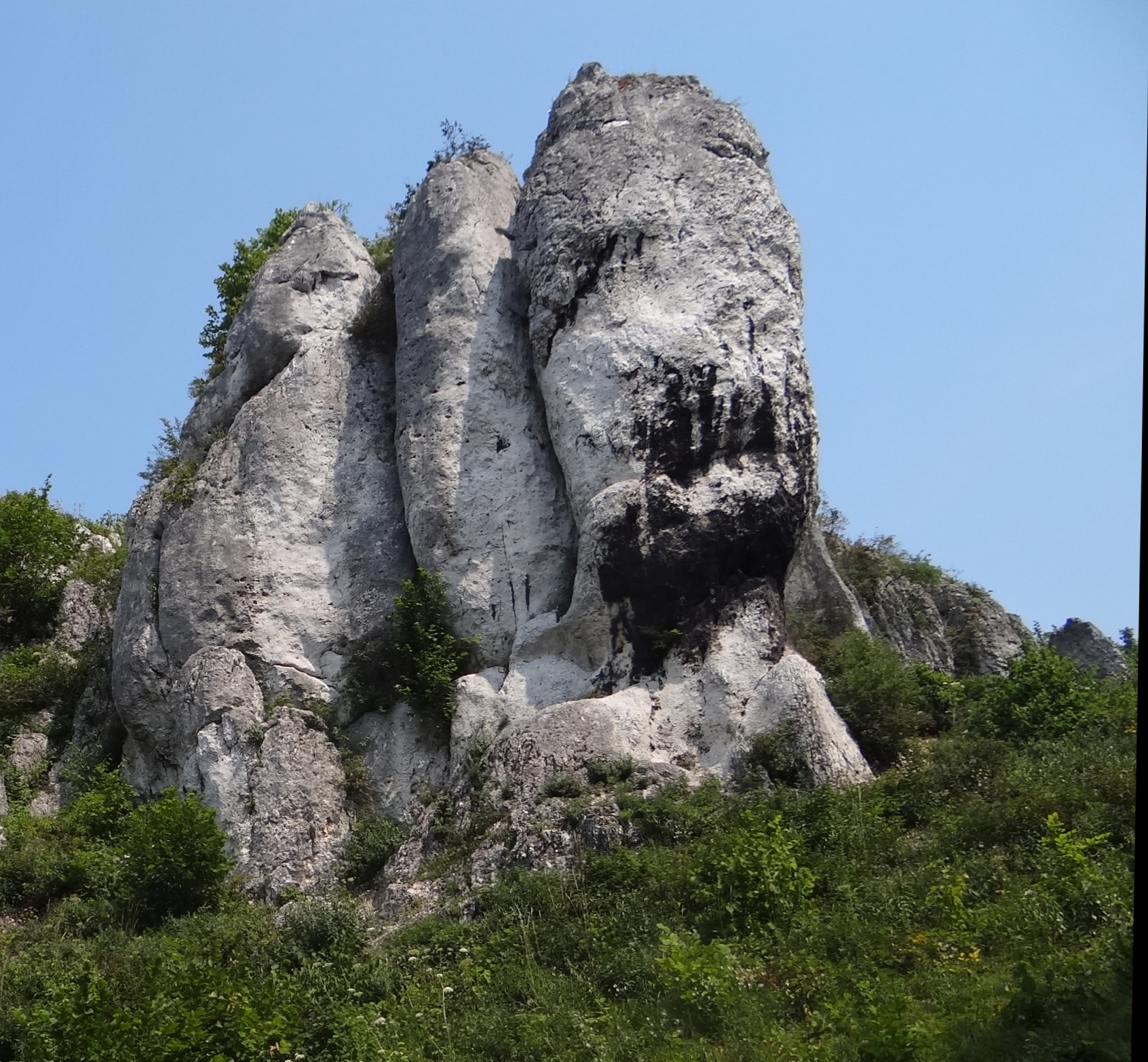 Skała Kruk na Górze Zborów w Podlesicach